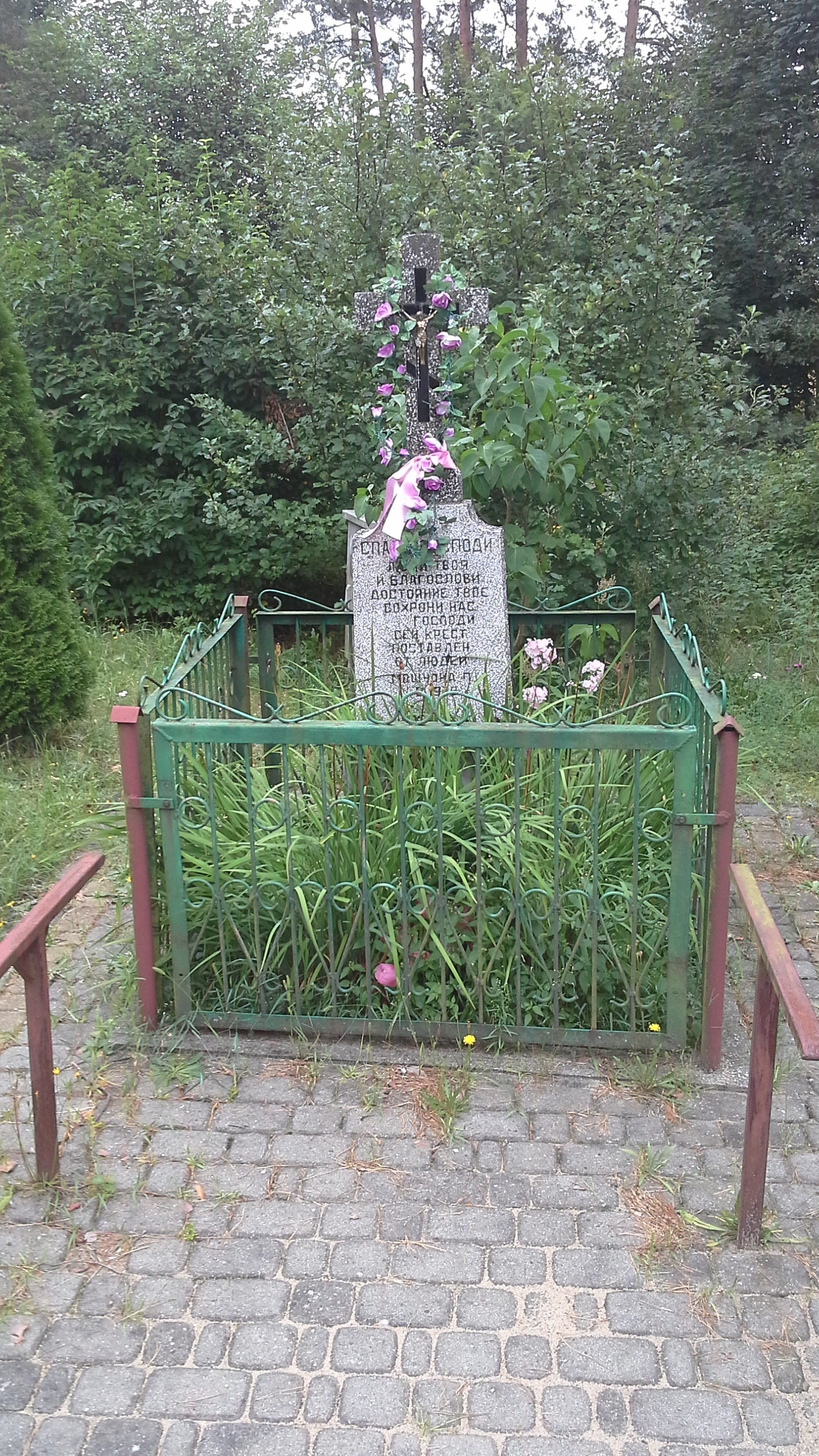 Krzyż wotywny przy zjeździe z drogi Milejczyce-Siemiatycze do Moszczony Pańskiej